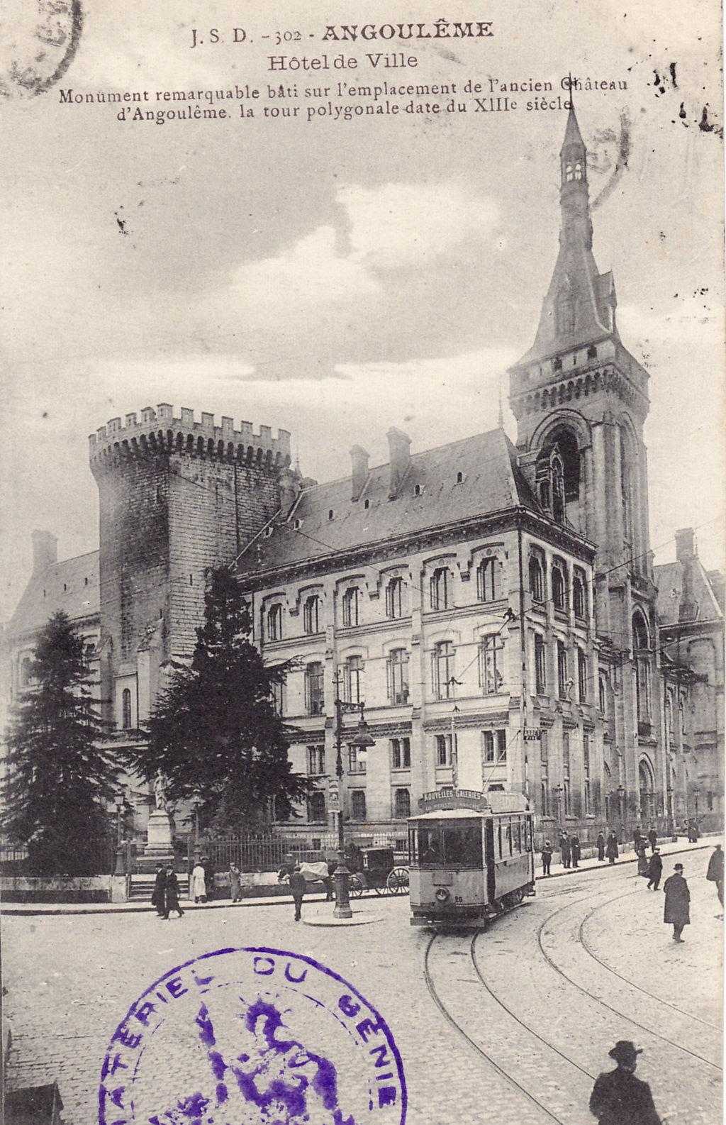 Carte postale ancienne éditée par J. S. D., n°302 : ANGOULEME Hotel-de-Ville - Monument remarquable bâti à l'emplacement de l'ancien Château d'Angoulême. La tour polygonale date du XIIIe siècle